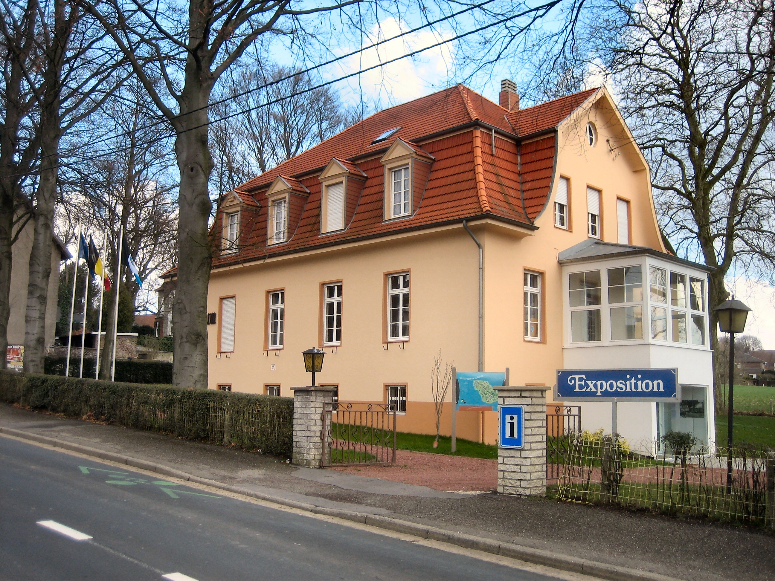 Göhltalmuseum in Neu-Moresnet, Kelmis, Belgien